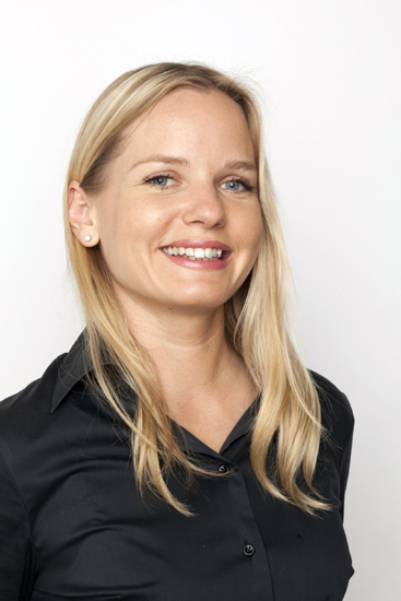 ThDr. Kateřina Klasnová, místopředsedkyně sněmovny.